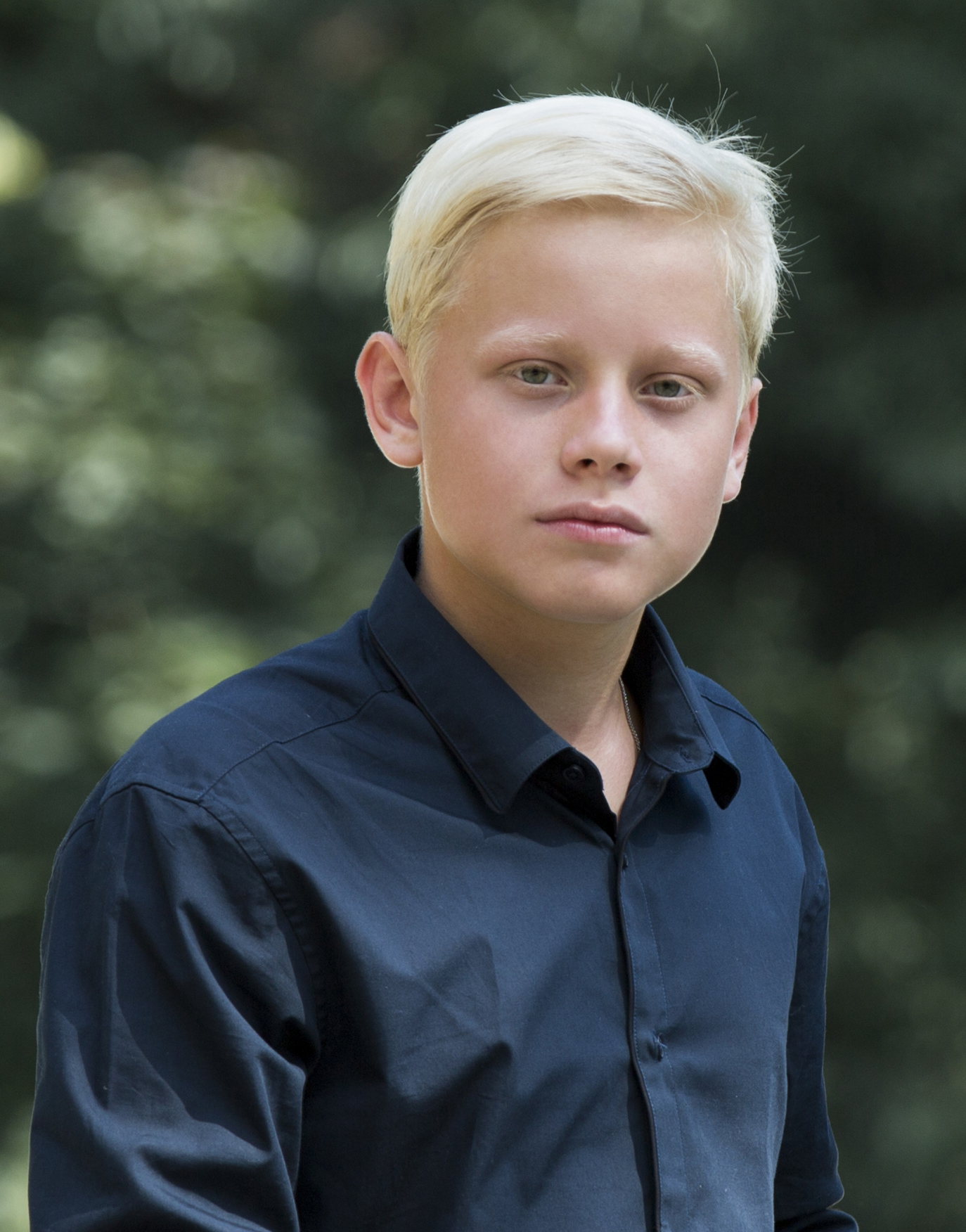 Александр Малофеев (август 2017). Фото Людмилы Малофеевой.